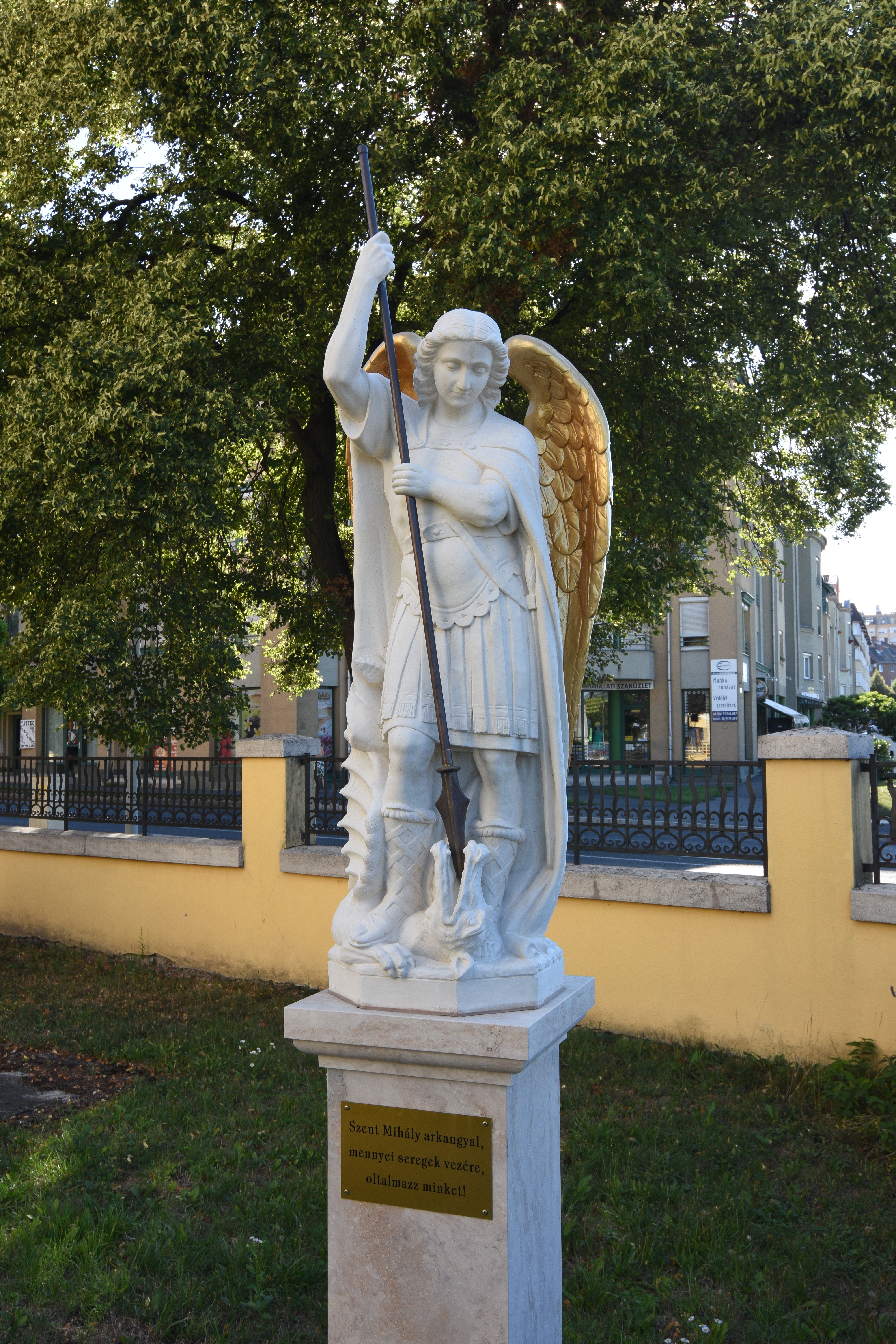 Zalaegerszeg Ferences templom